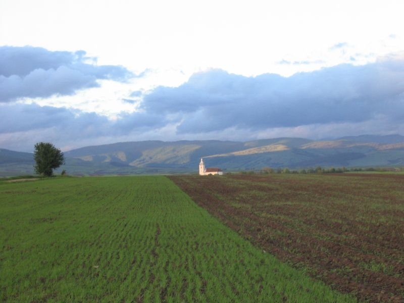 Torjai katolikus templom, 2006